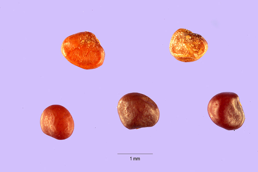 Lotus pedunculatus Cav. - big trefoil